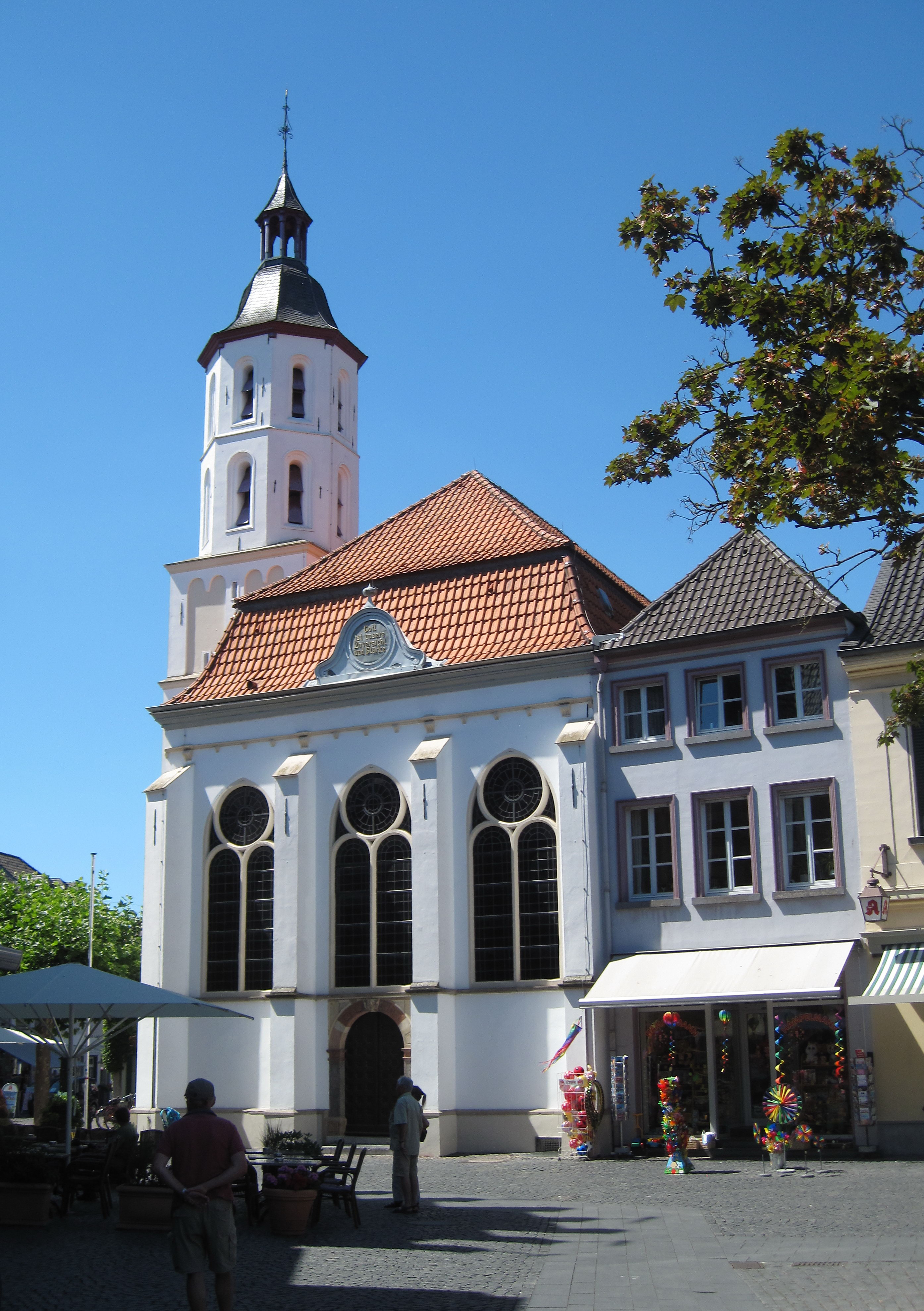 Evangelische Barockkirche in Xanten, Kurfürstenstraße 1 This image shows a heritage building in Germany, located in the North Rhine-Westphalian city Xanten (no. 4).